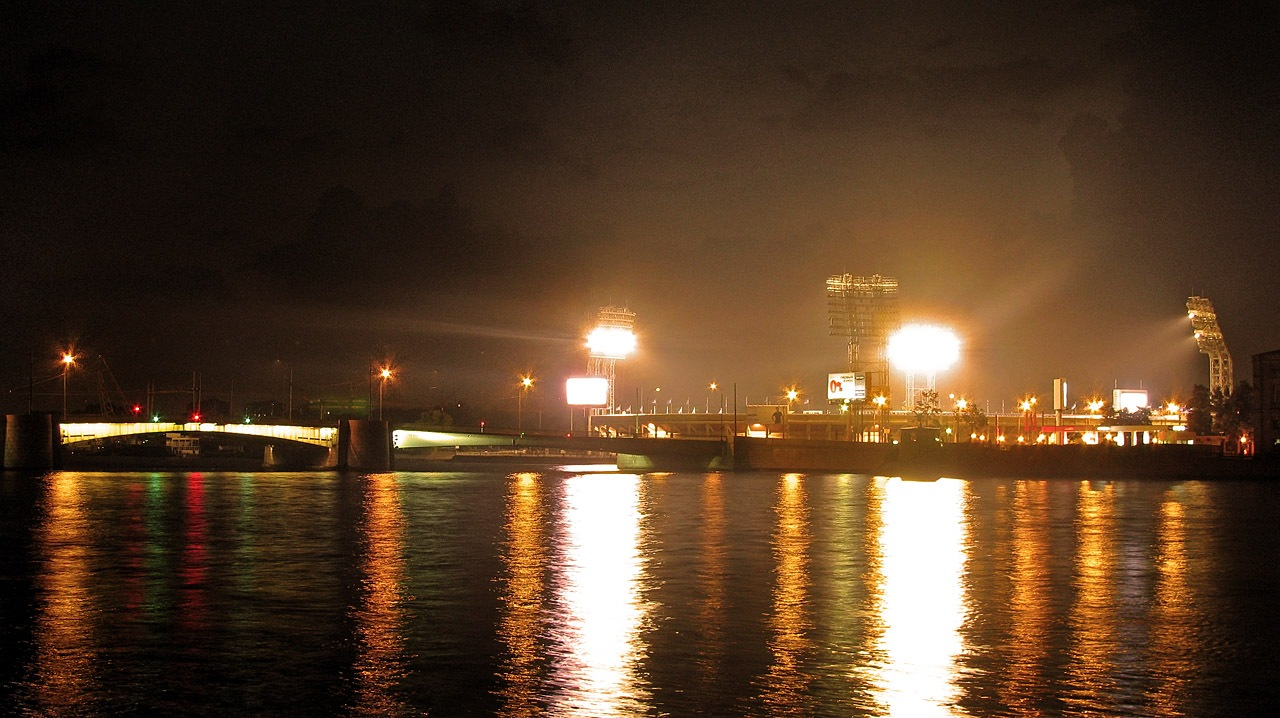 Вид на Петровский стадион и Тучков мост